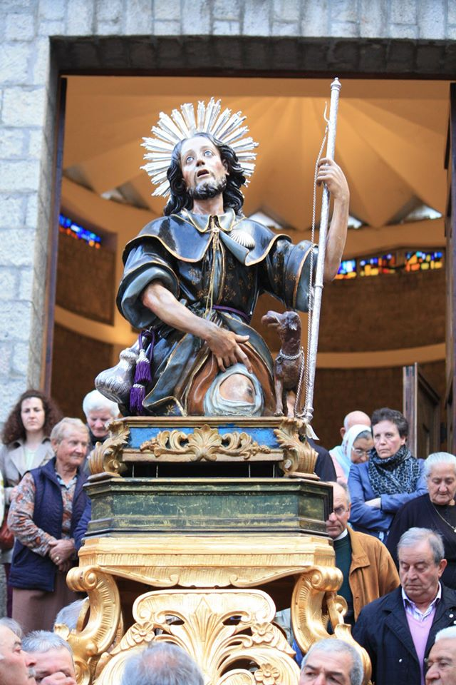 San rocco di maggio a Satriano di Lucania